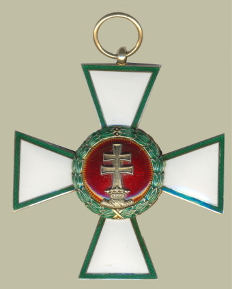 Magyar Érdemkereszt nagykeresztje 1923-1935